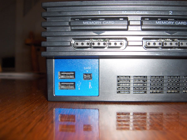 PlayStation 2 aansluitingen voorzijde console (Modelnummer SCPH-35004), zelfgemaakte foto, GFDL